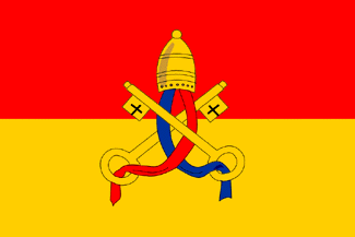 Bandera de Ancona (Estados Pontificios).